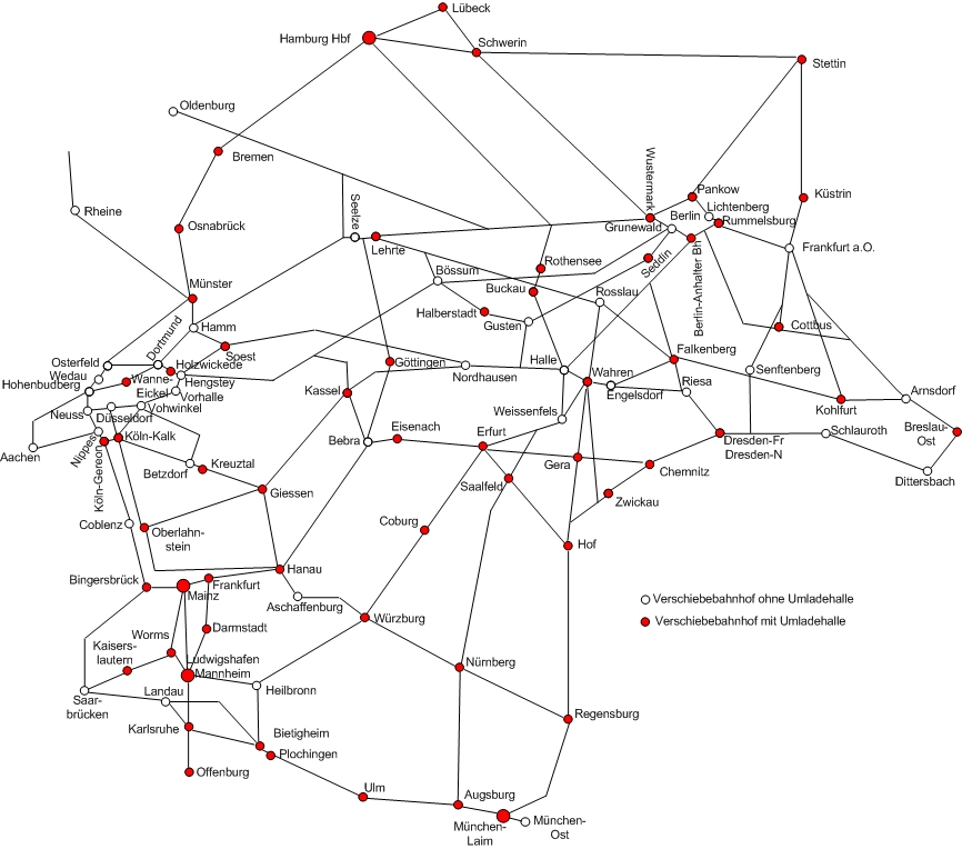 Stückgutenhallen der Reichsbahn 1933